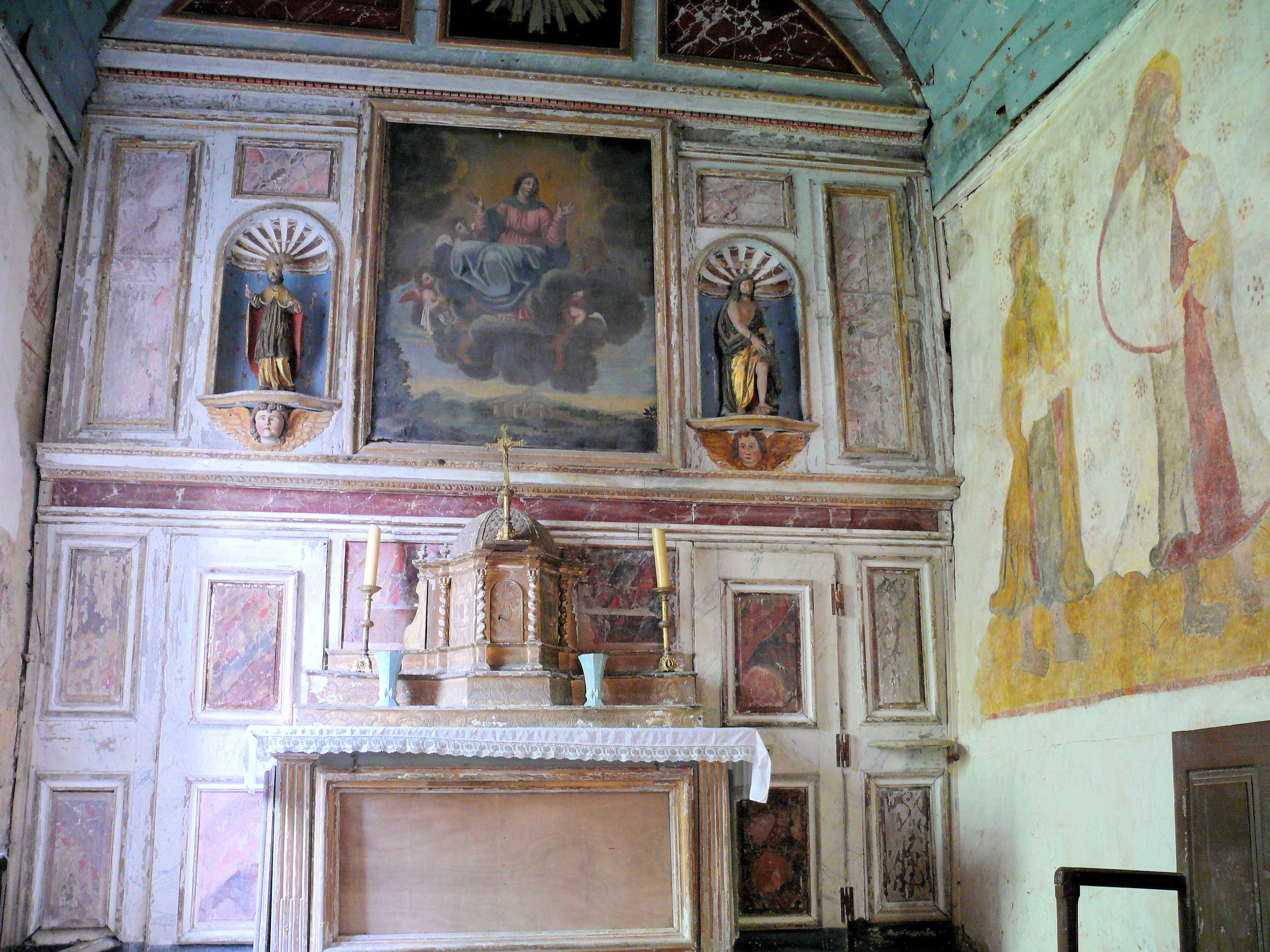 Gouzon (Creuse, France),village Les Forges, église Saint-Nicolas, maître-autel avec son tabernacle, retable avec son tableau l'Assomption et deux statues en bois peint et doré d'un saint évêque et de Saint Jean-Baptiste.